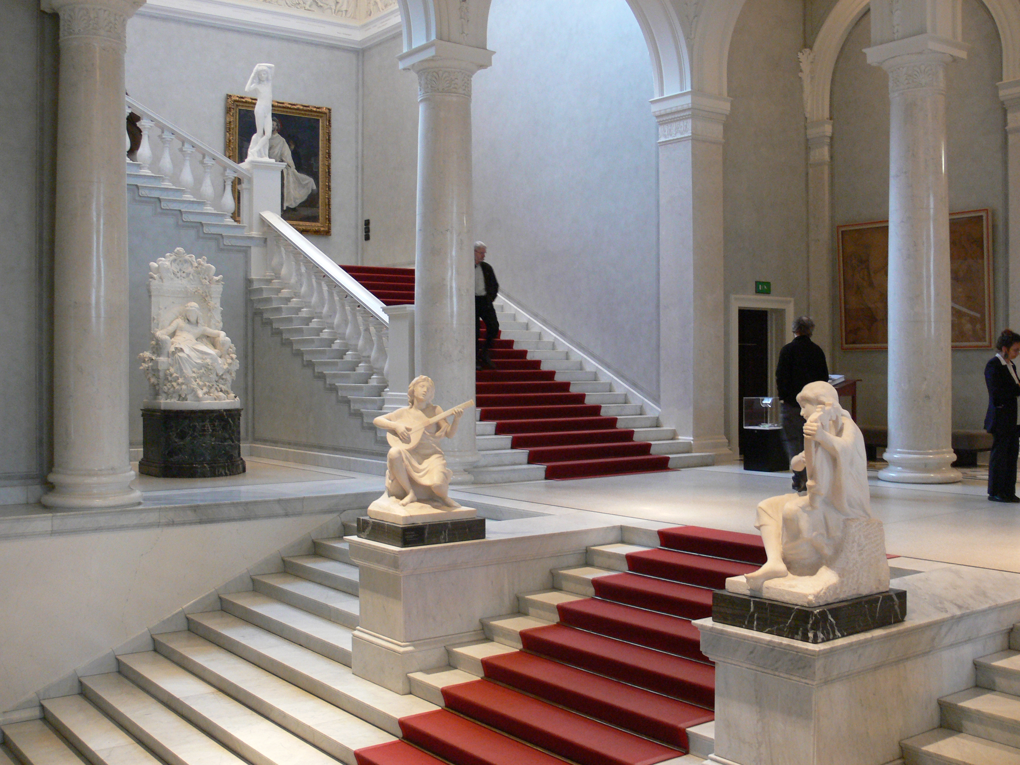 Treppenhaus der Alten Nationalgalerie Berlin